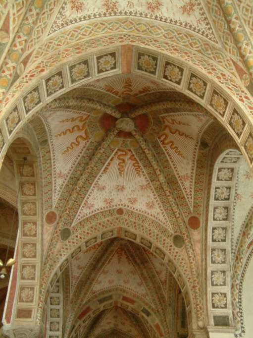 Santa Maria delle Grazie - boltă